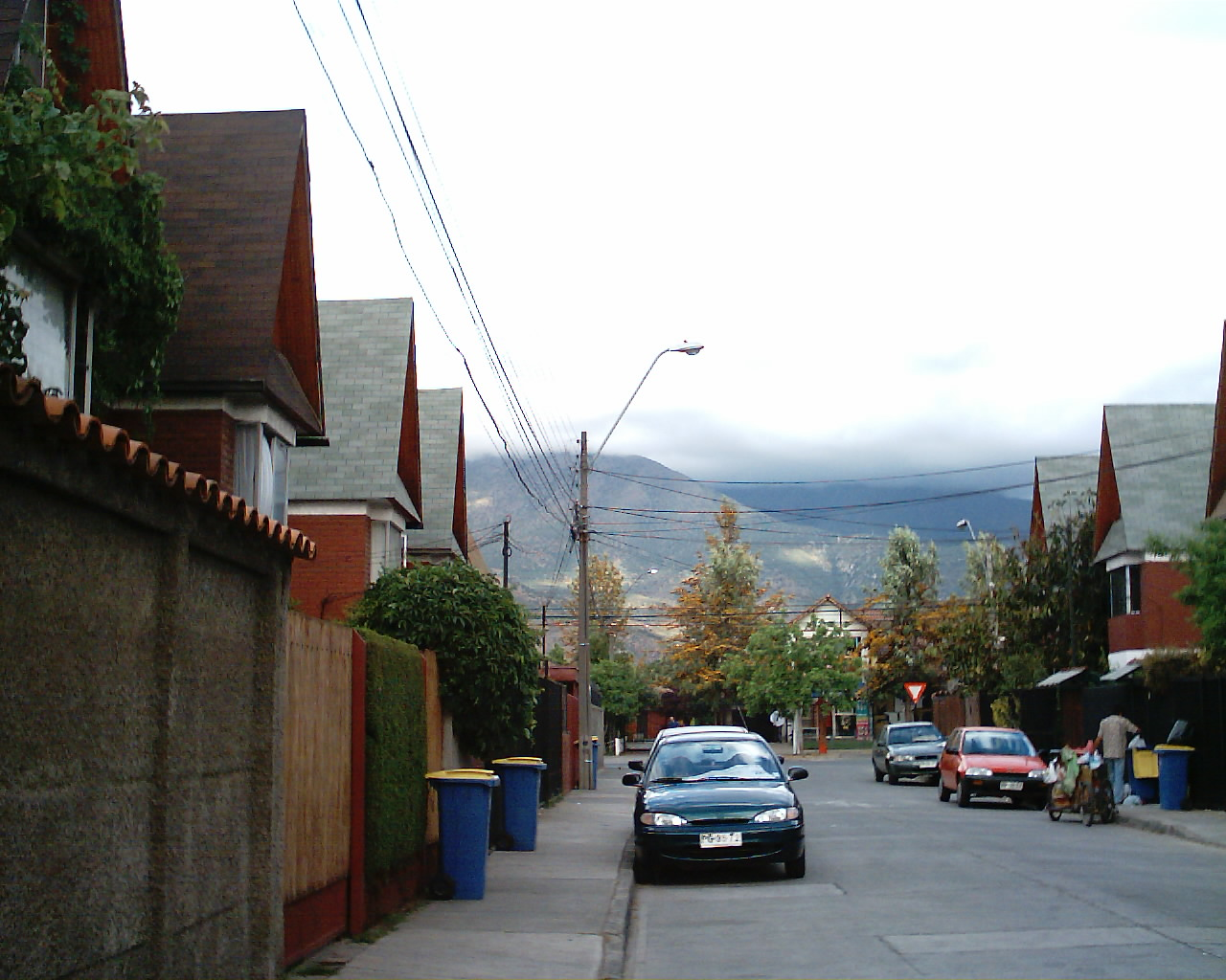 Fotografía de una calle de La Florida, Santiago de Chile, tomada por Der schöne Tod.